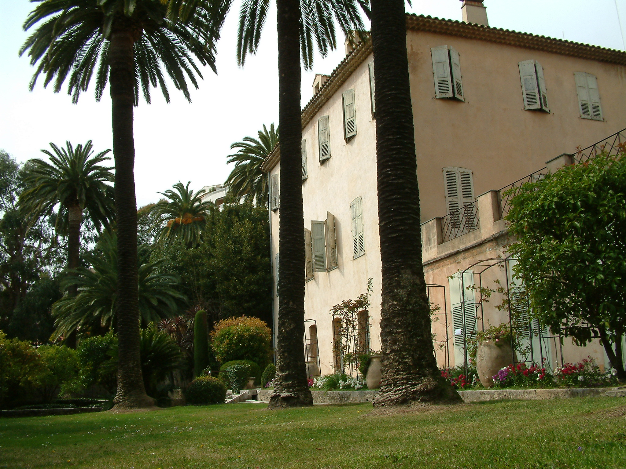 (fr) Photographie de la Villa Fragonard qui abrite le musée. (en) Photograph of the Fragonard's Museum building.